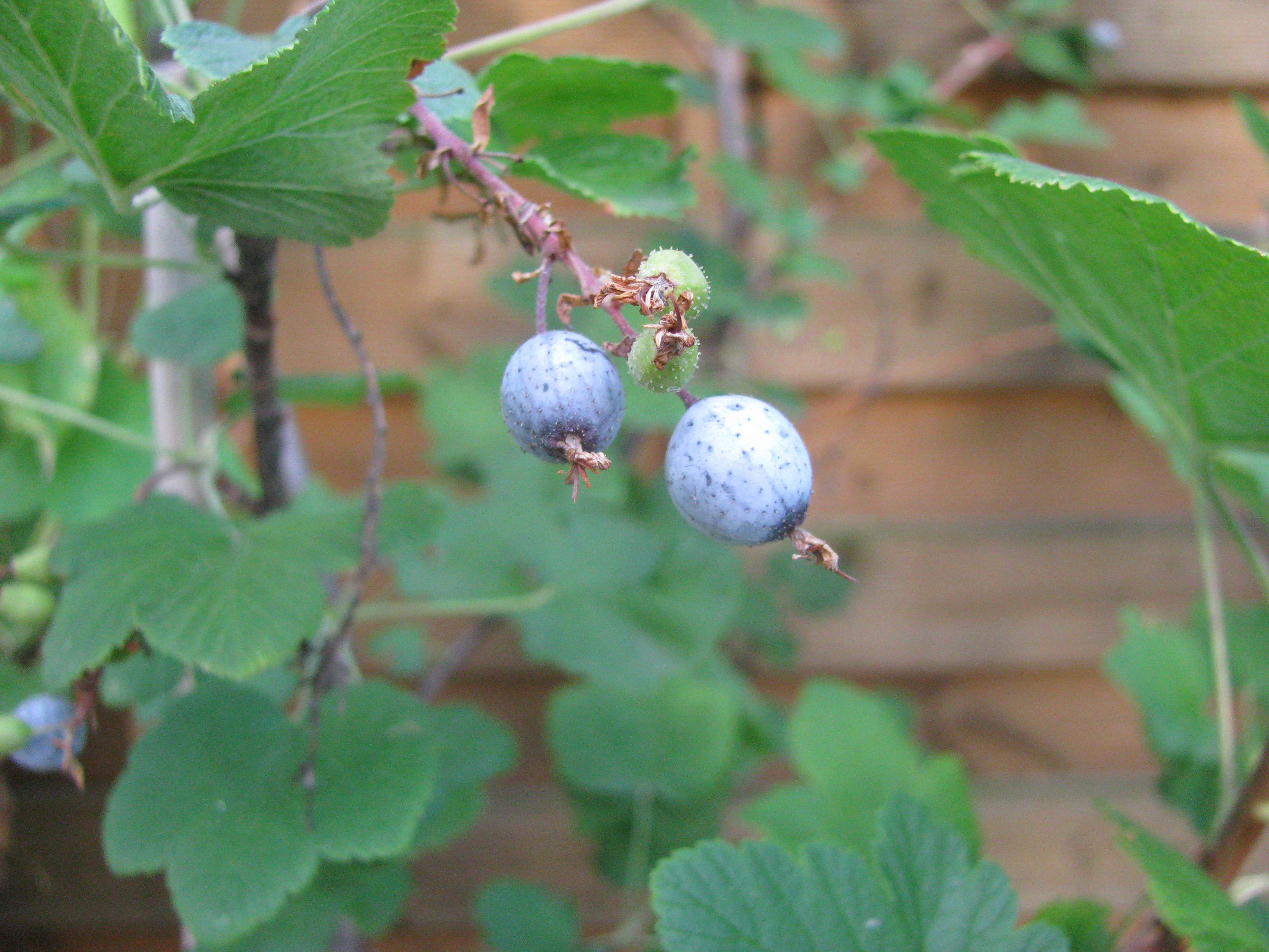 Frucht der Blutjohannibeere (Ribes sanguineum)